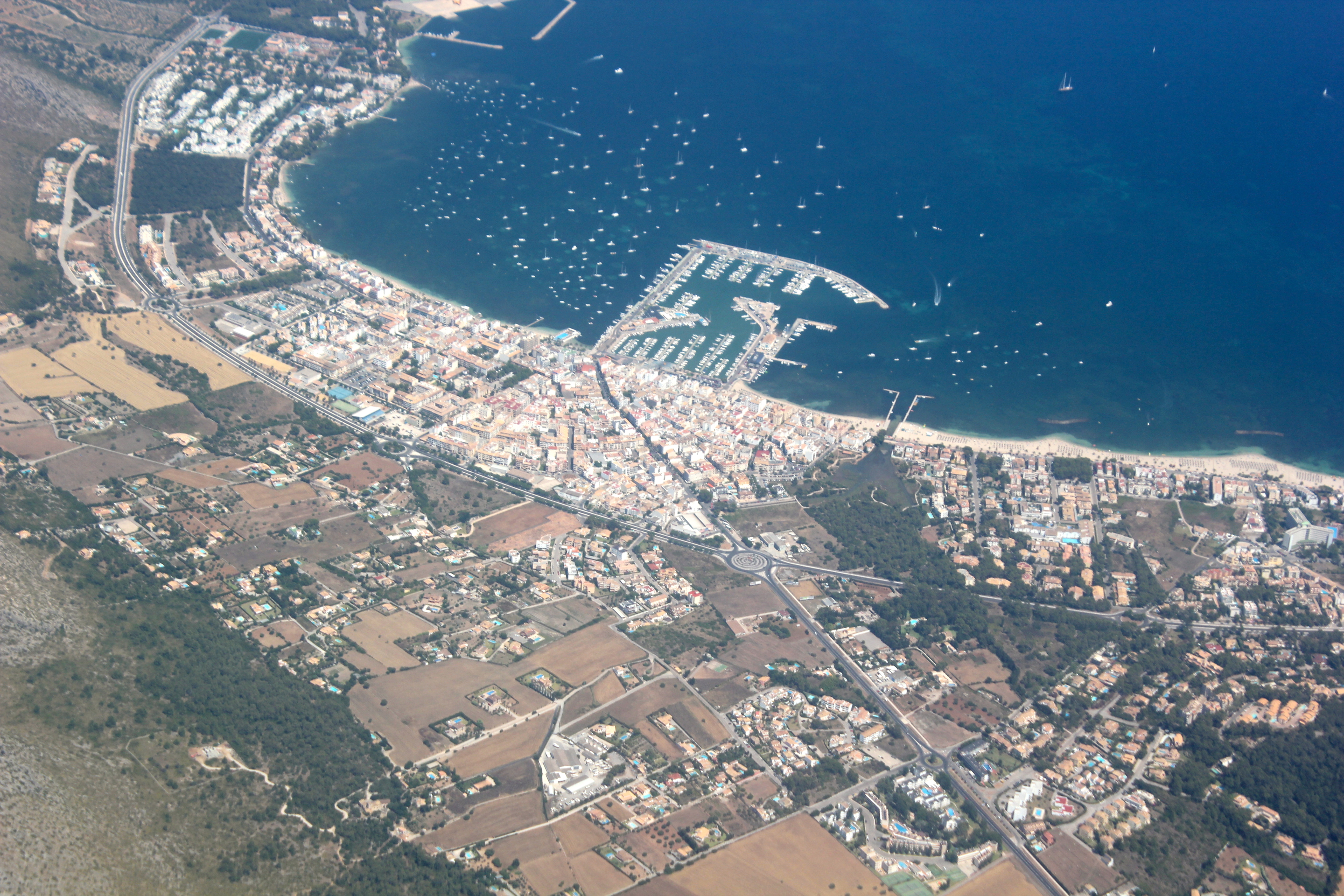 Vista aèria del Port de Pollença